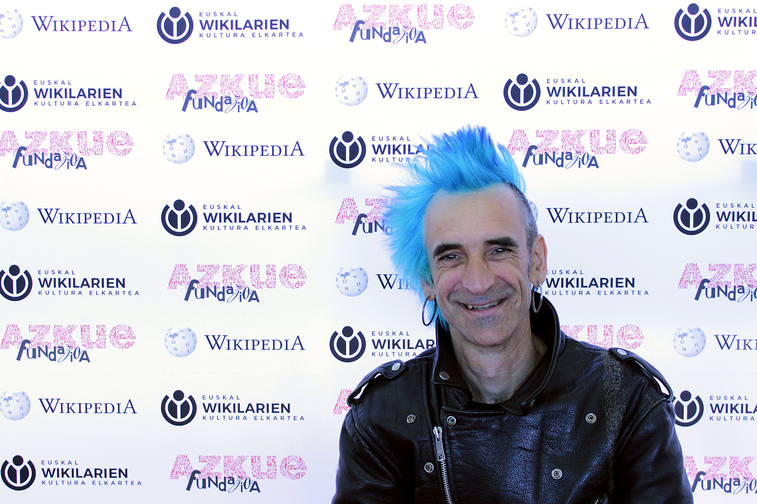 Txapelpunk musika taldeko Iñigo Arrasate "Txapel" abeslaria Azkue Fundazioaren eta Euskal Wikilarien Kultura Elkartearen photocallean